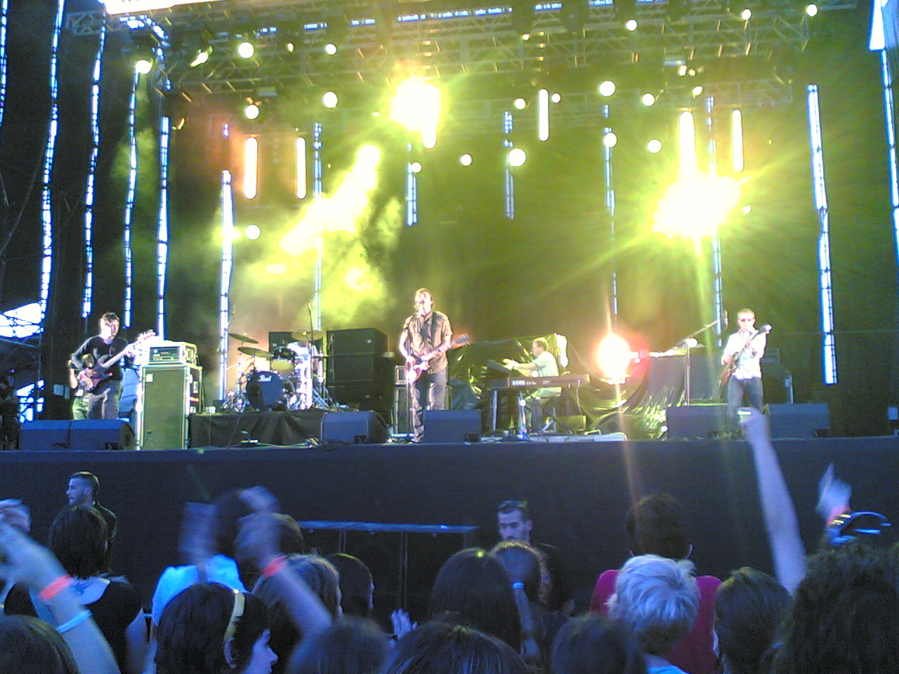 Un poco hooligans, pero no demasiado. Chulo el concierto.